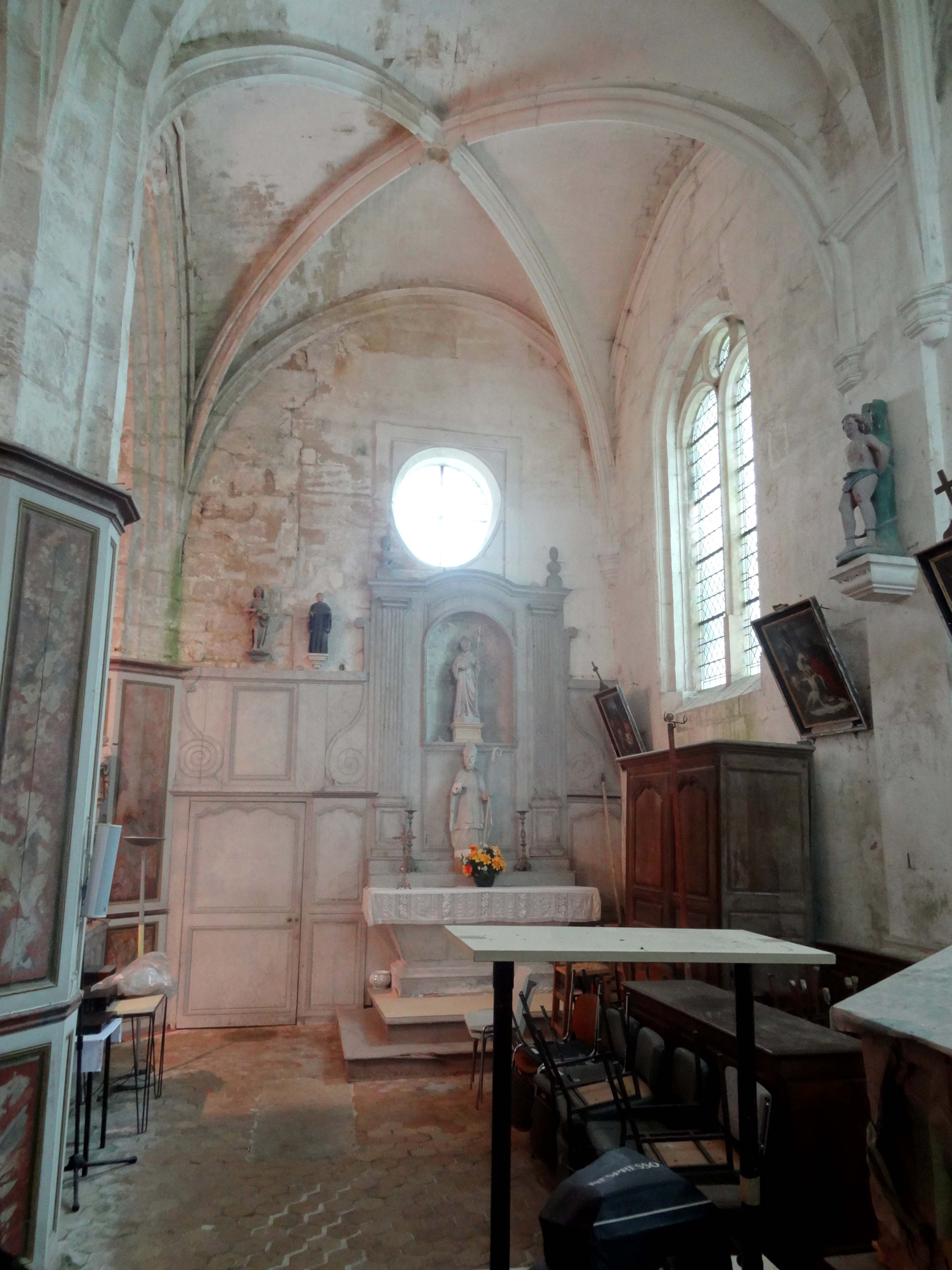 Intérieur de l'église - voir titre.